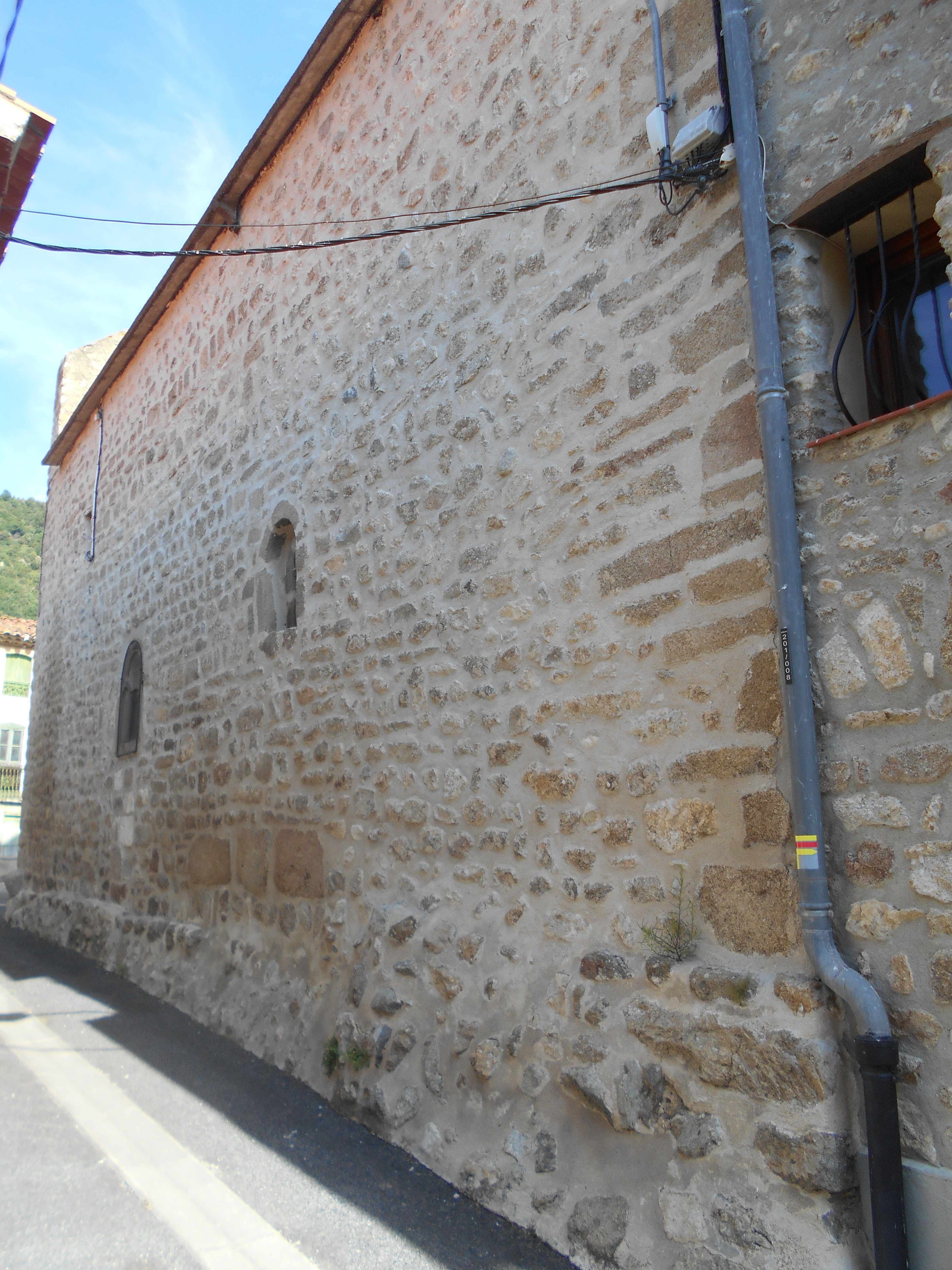 Sant Andreu de Tarerac des del nord-uest